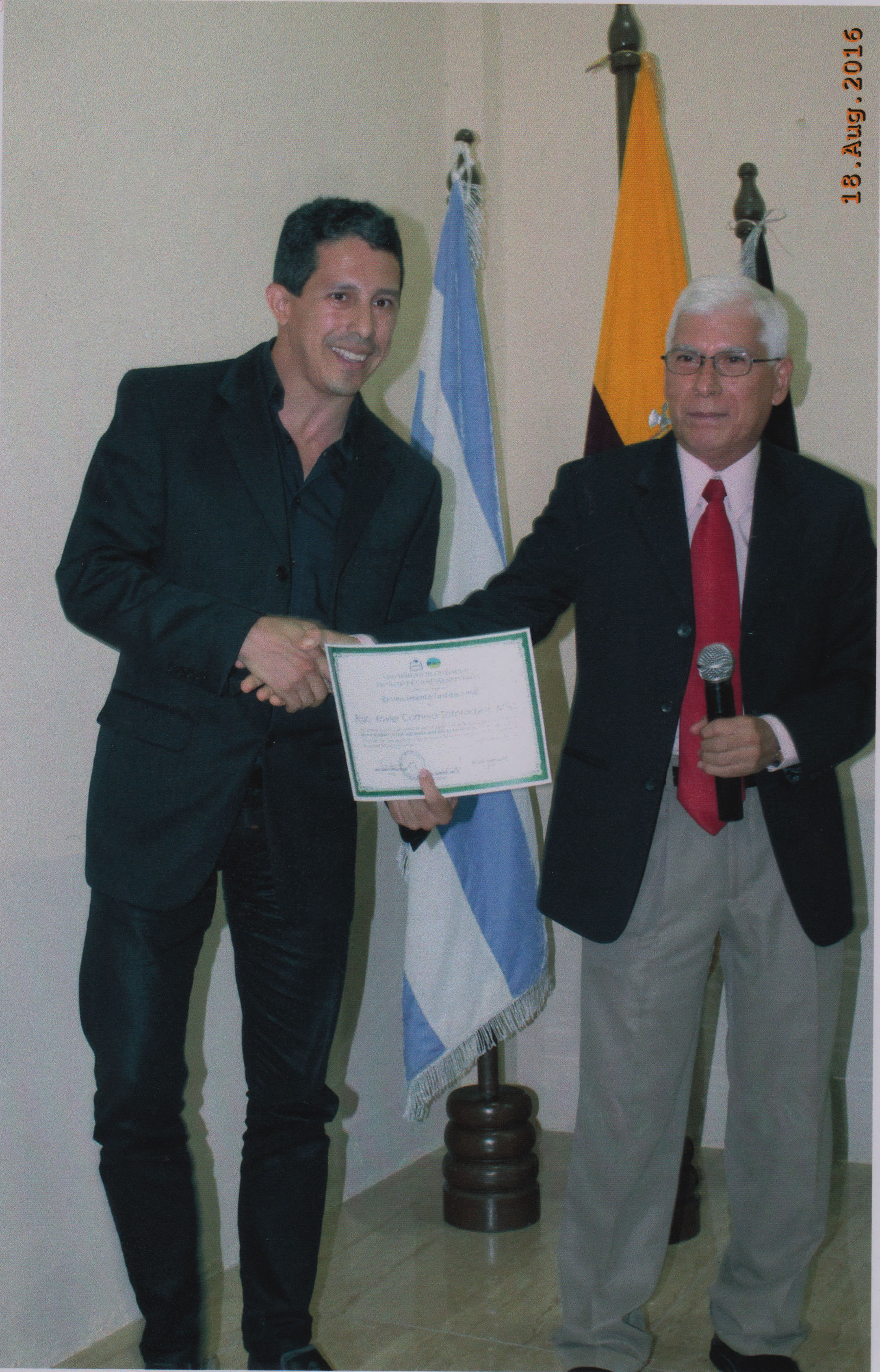 Reconocimiento por mayor numero de articulos cientificos publicados, Ago 2016, aniversario 47 de la Facultad de Ciencias Naturales, Universidad de Guayaquil